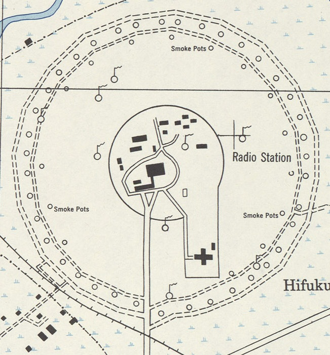 美軍繪製地圖上的鳳山無線通信所